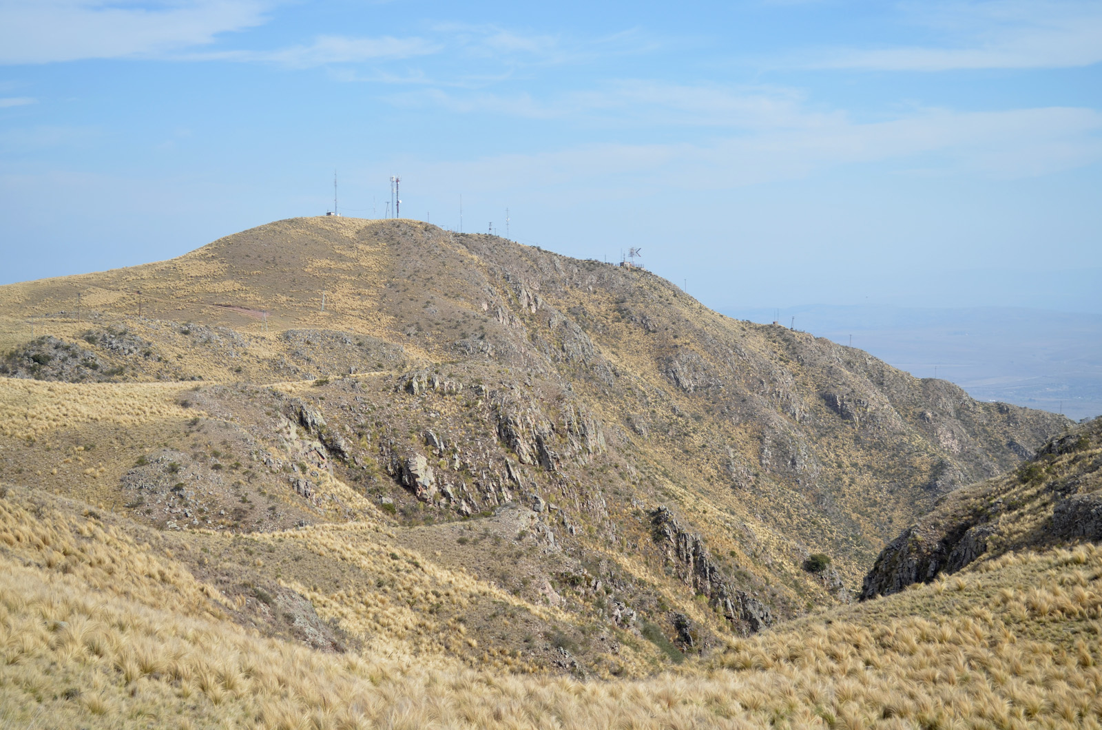 Cerro La Rosilla, Los Cocos, Córdoba, Argentina